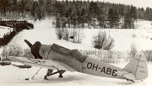 Kapteeni Wäinö Bremerin Junkers A50 (OH-ABB)